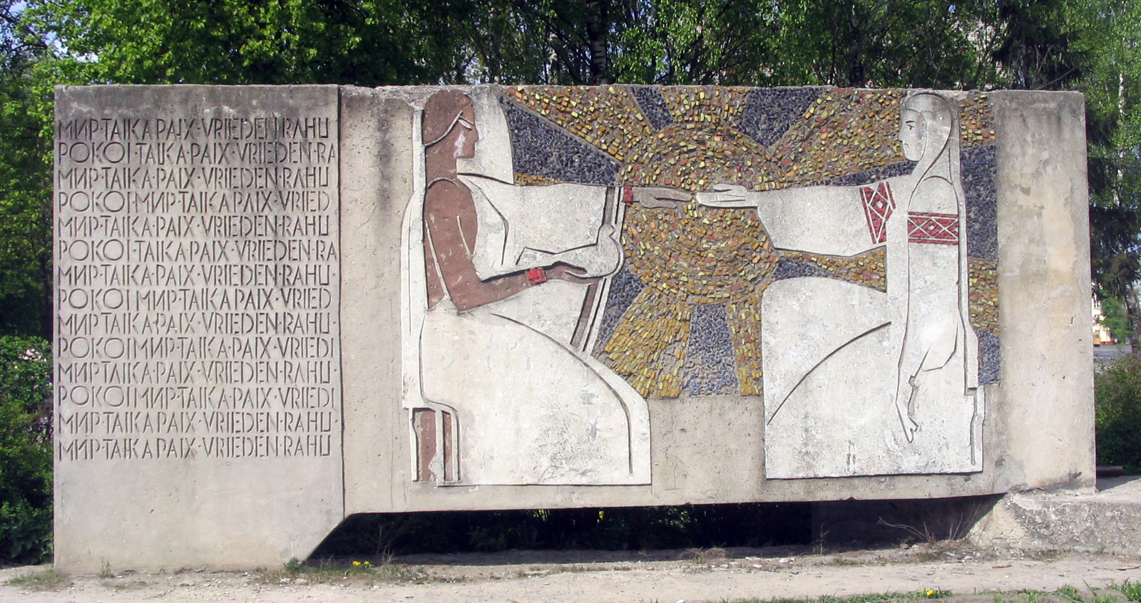 Монумент дружбы народов